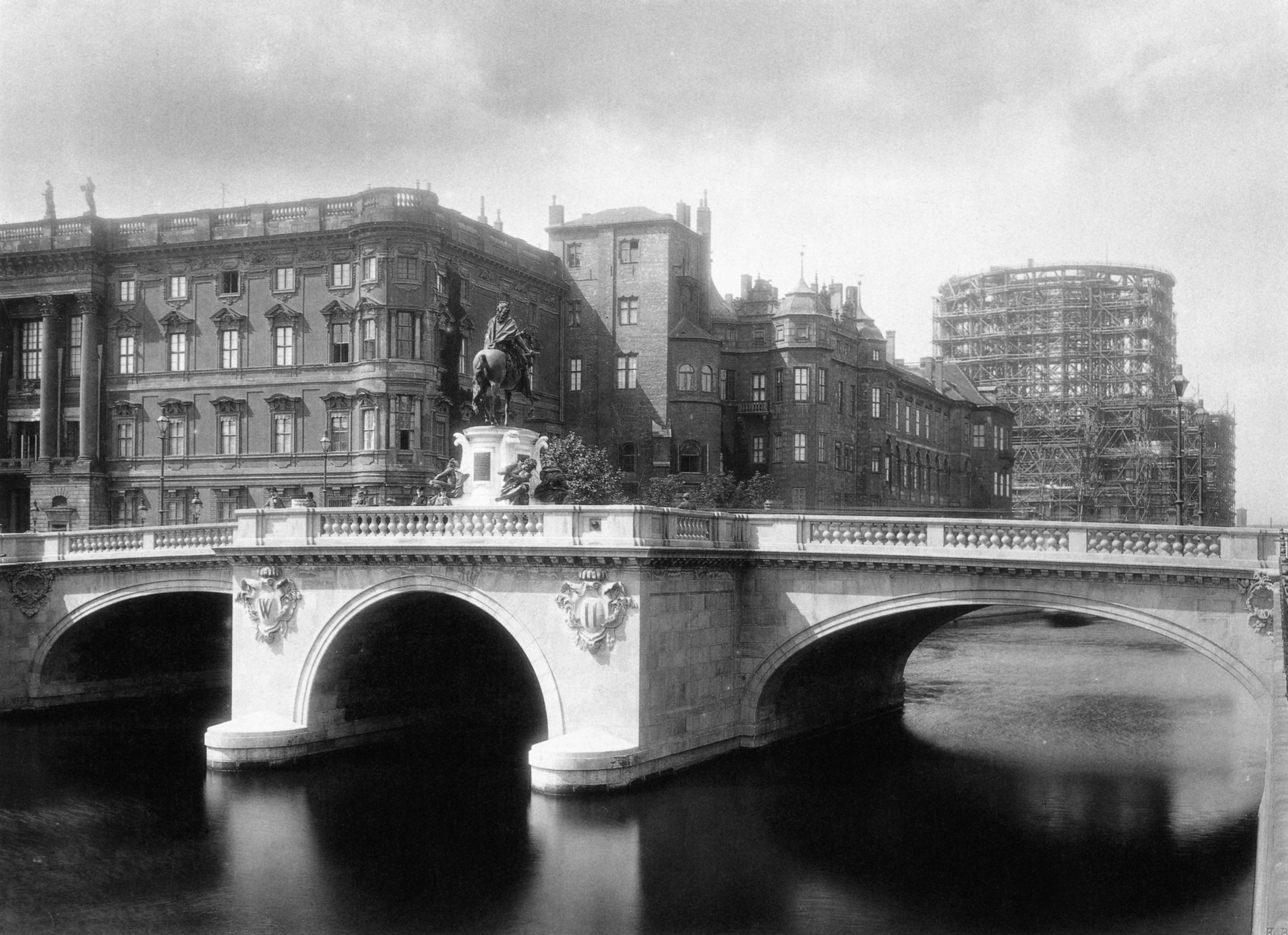 Kurfürstenbrücke (an dieser Stelle heute Rathausbrücke) über die Spree in Berlin